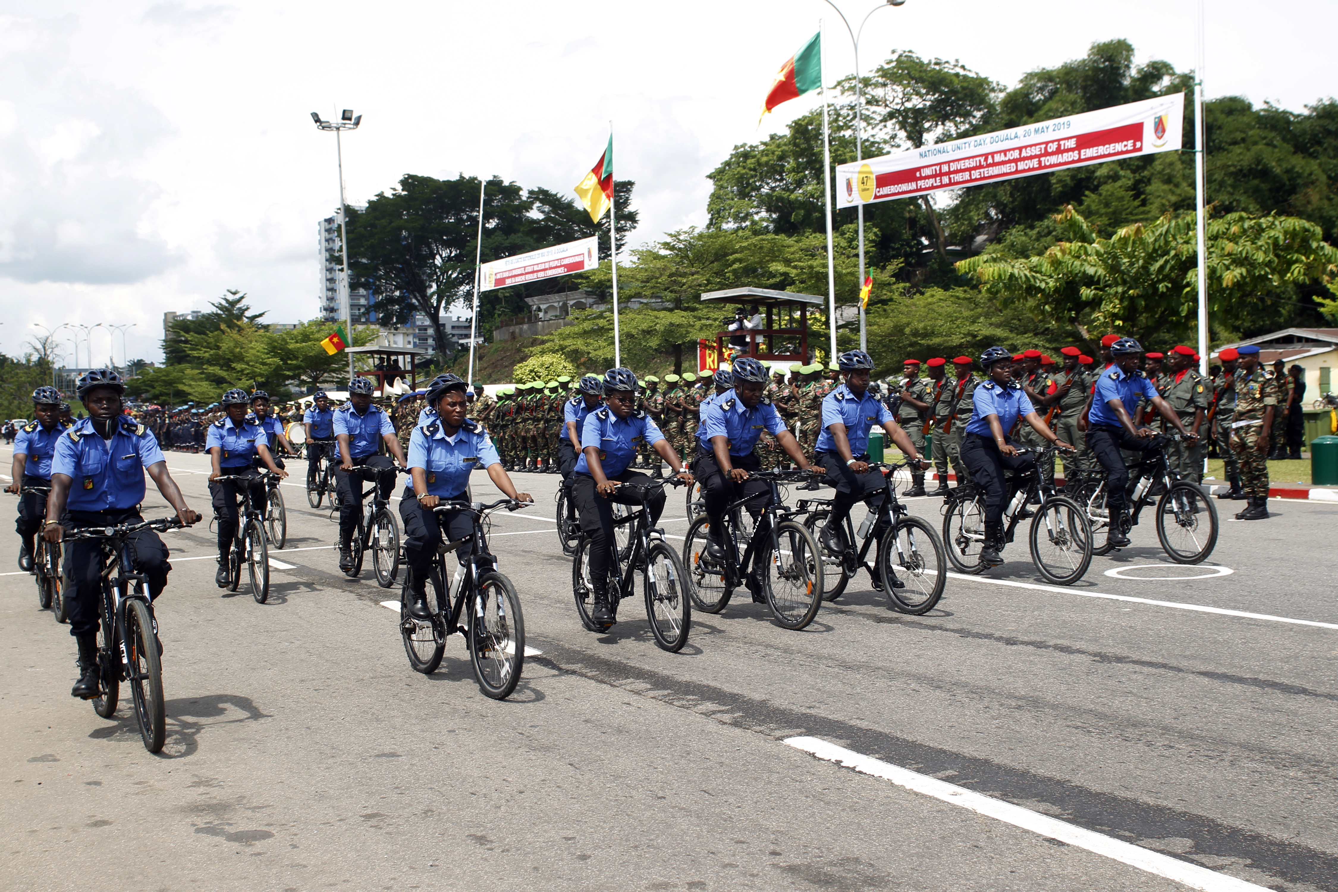 Défilé de la police camerounaise sur vélo lors de la fête national du Cameroun le 20 mai 2019 à Douala.